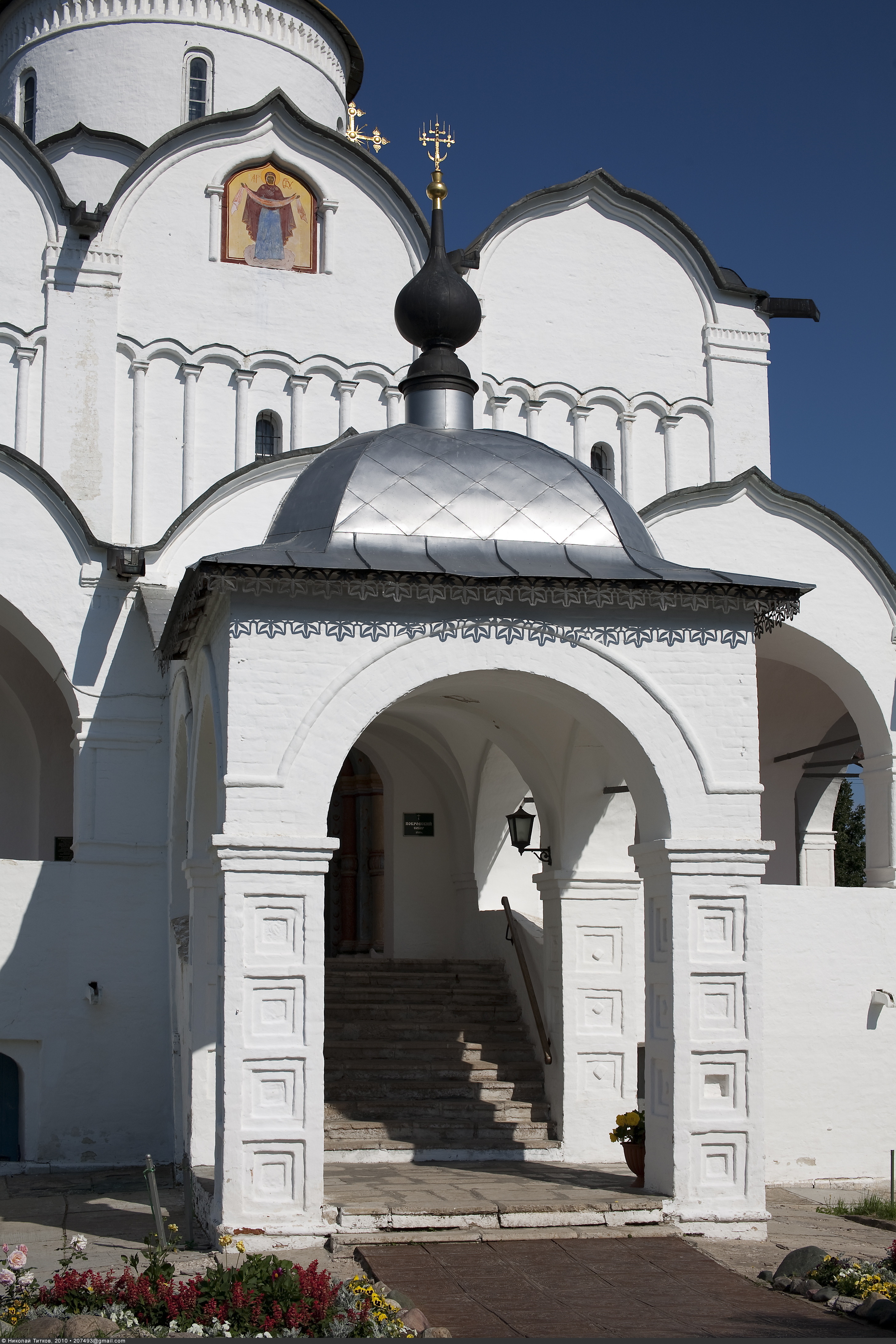 Покровский собор (1510—1518 гг.) Покровского женского монастыря (Суздаль)